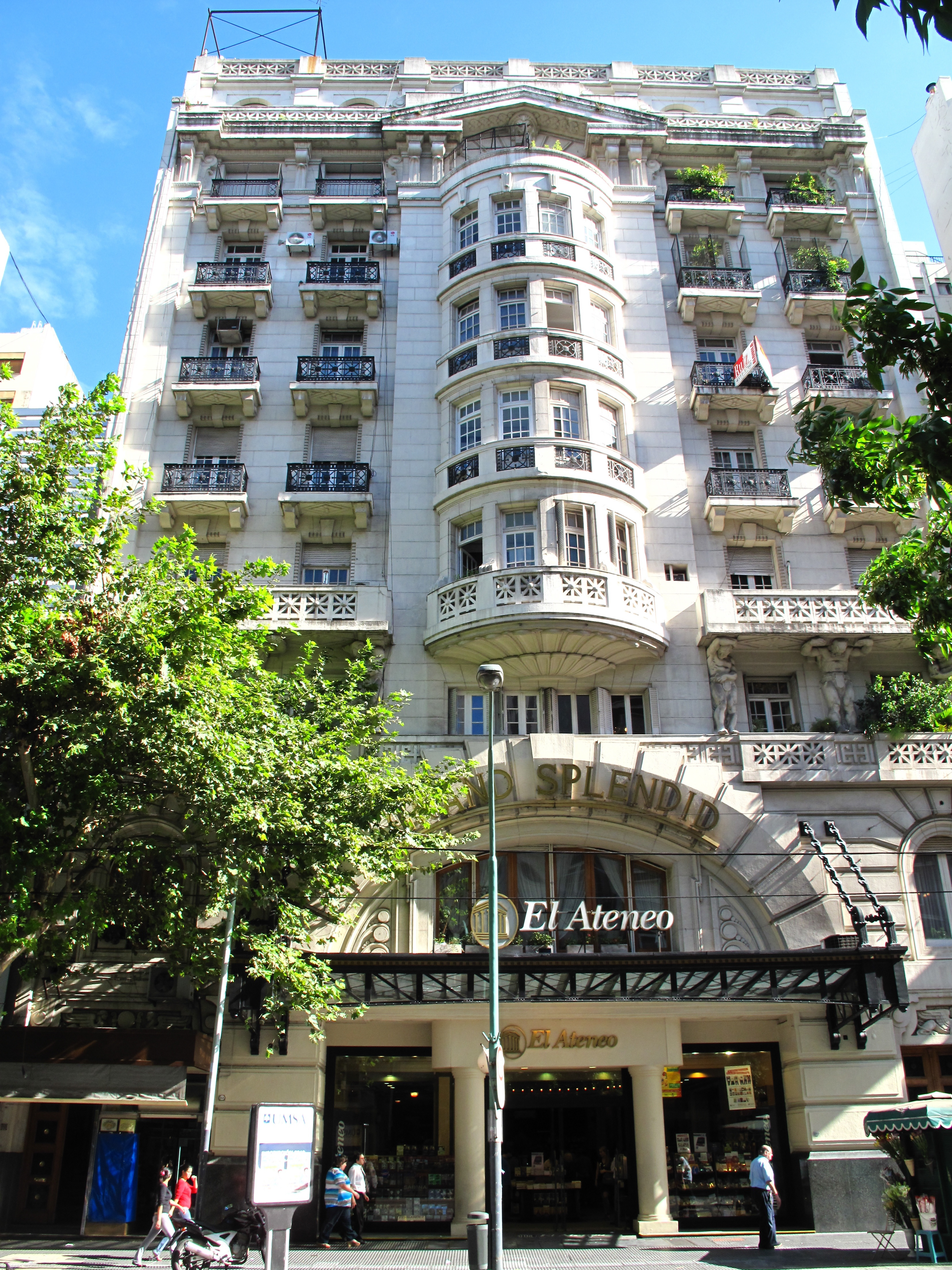 El Ateneo bookstore, Buenos Aires